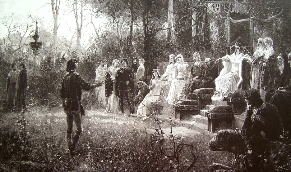 BOCCACCIO AM HOFE DER KÖNIGIN JOHANNA VON NEAPEL